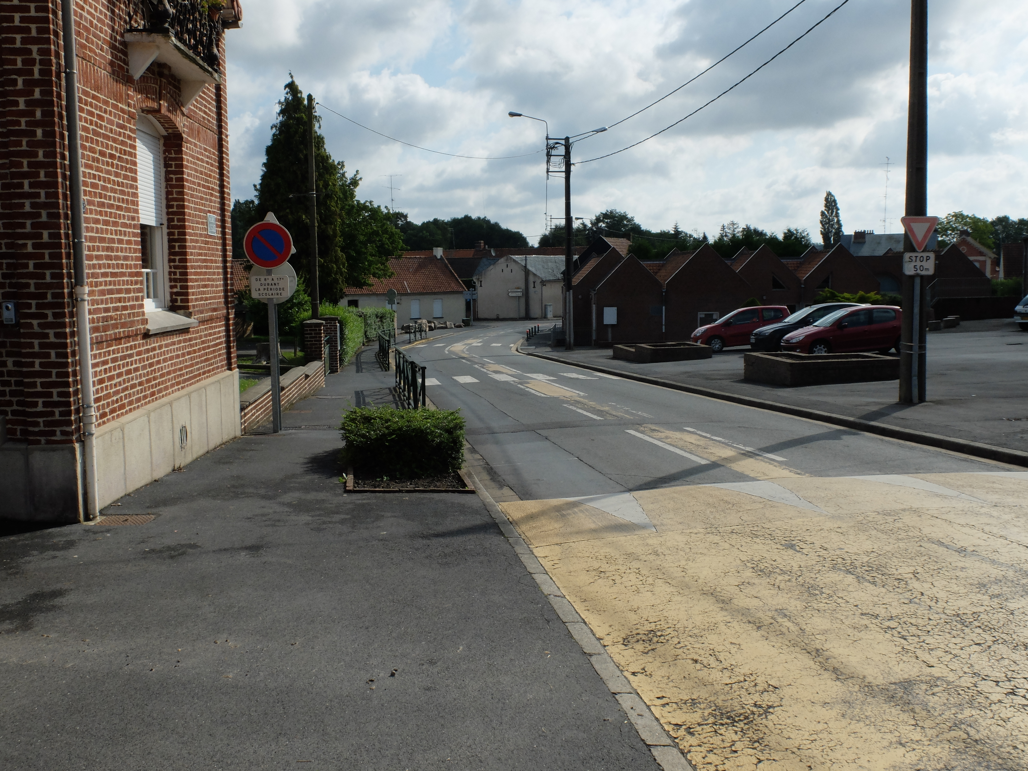 Vue de la rue de la Turquerie de Noyelles-sur-Selle à hauteur de la place de l'église.